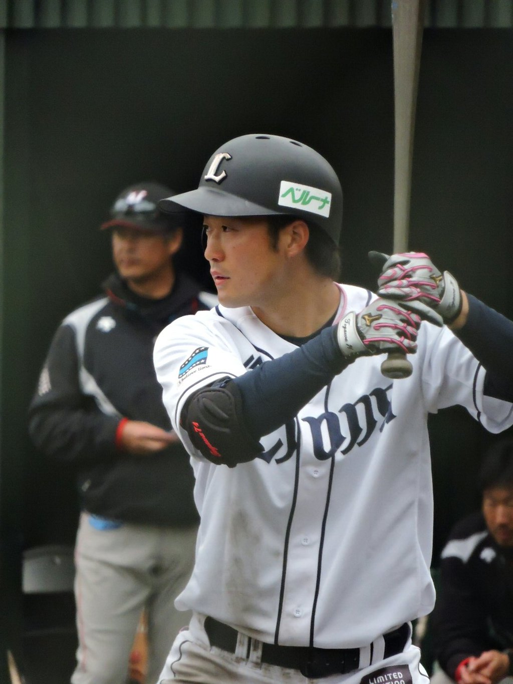 戸川大輔外野手/2016.04.05